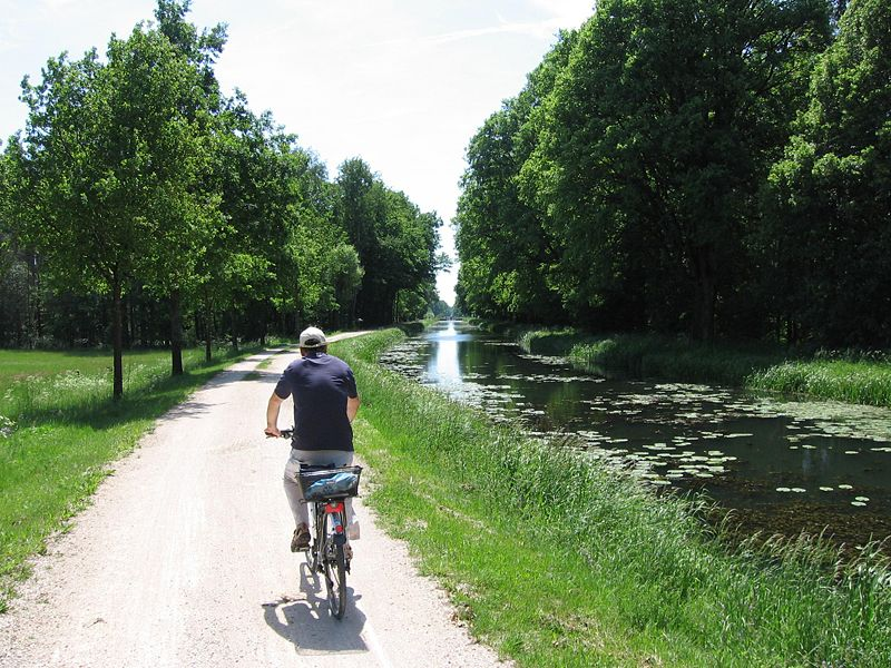 Fahrradweg am L.-D.-M. Kanal(bei Neumarkt/Opf.)